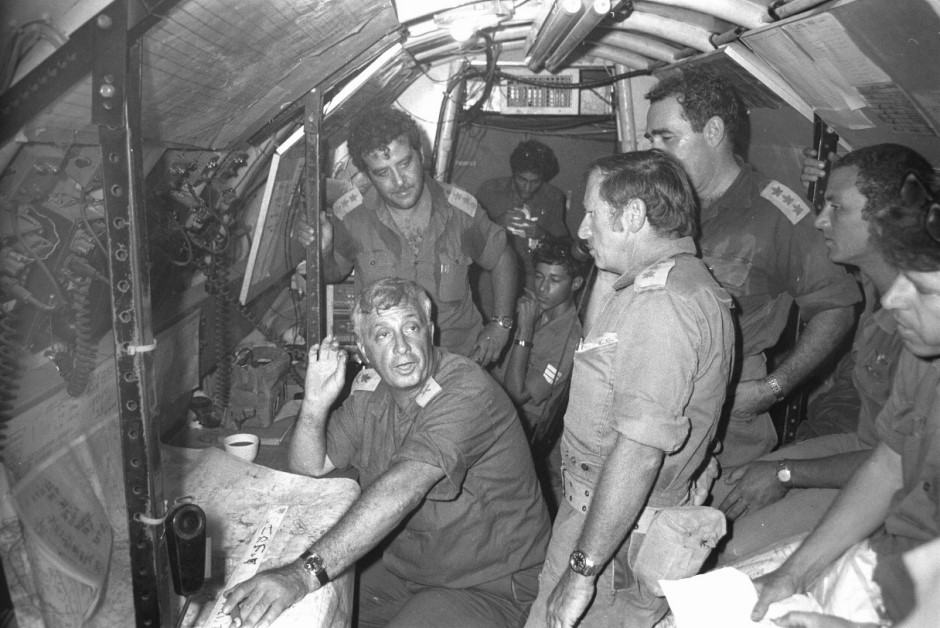 עומד מימין: סא"ל הלל כרמלי, קצין הקשר האוגדתי, יושב משמאל: האלוף אריאל (אריק) שרון, מפקד האוגדה